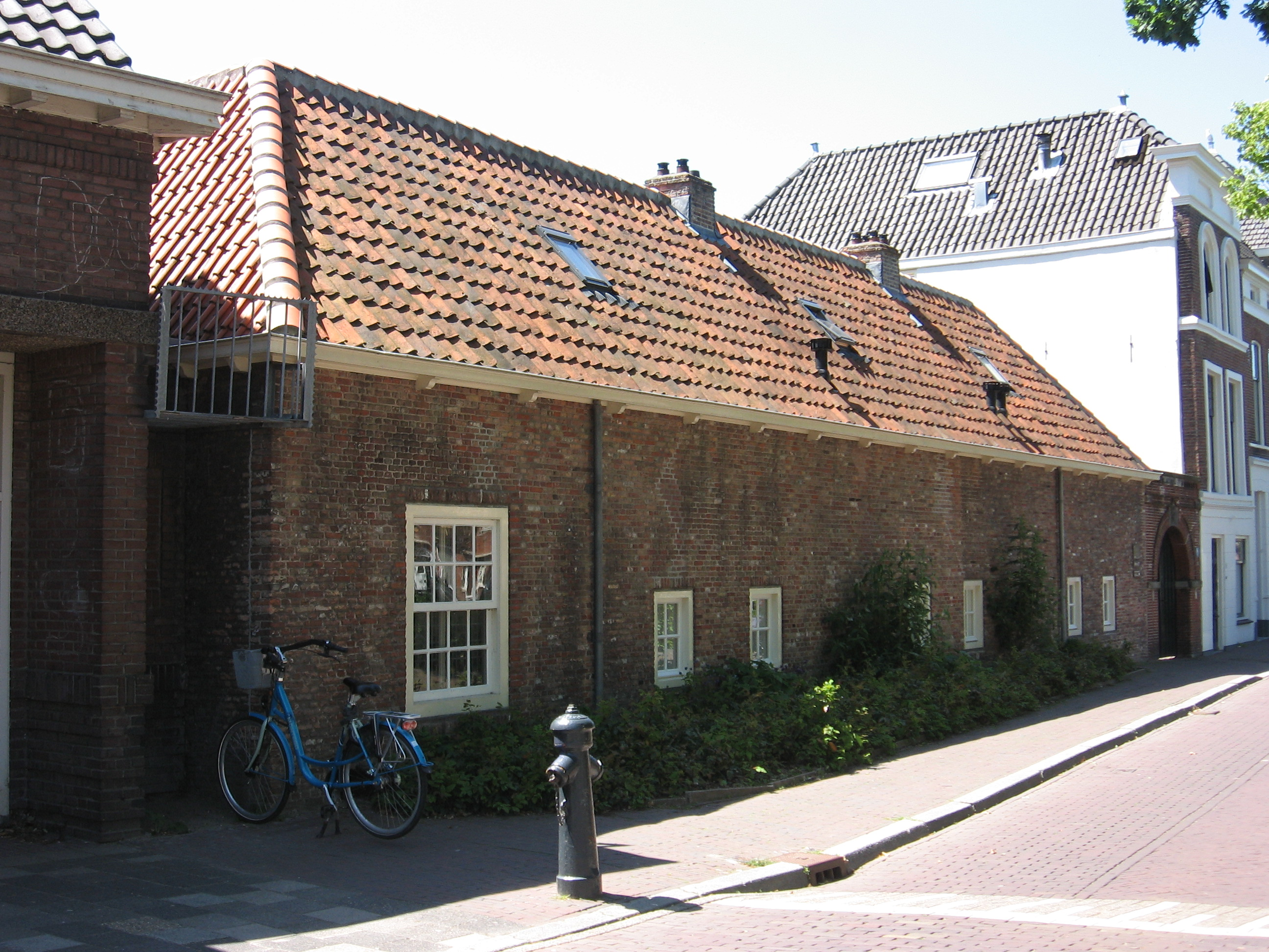 Delft - Oranjeplantage 58-79.jpg, rijksmonument